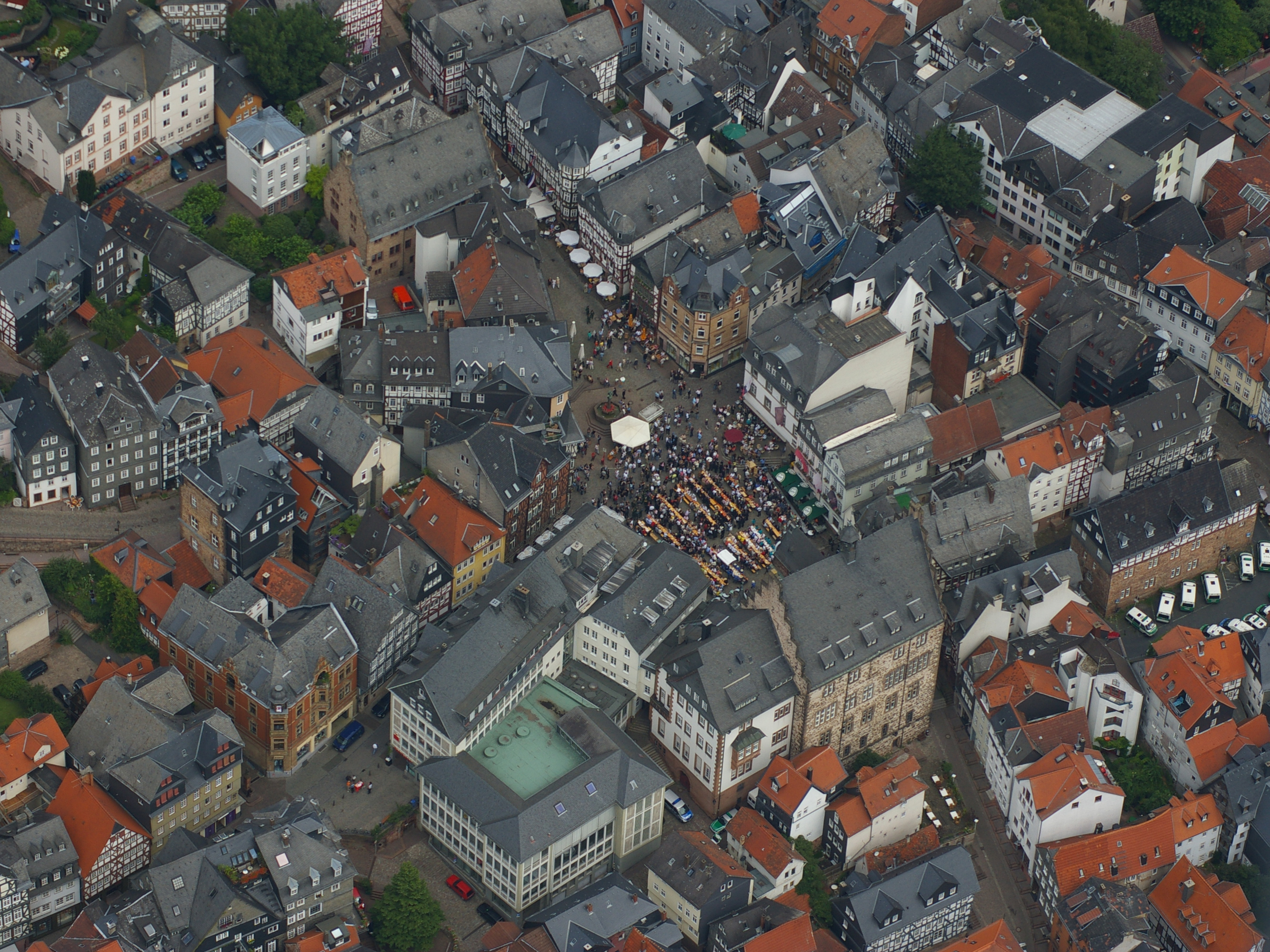 Luftaufnahme des Marburger Marktfrühschoppen